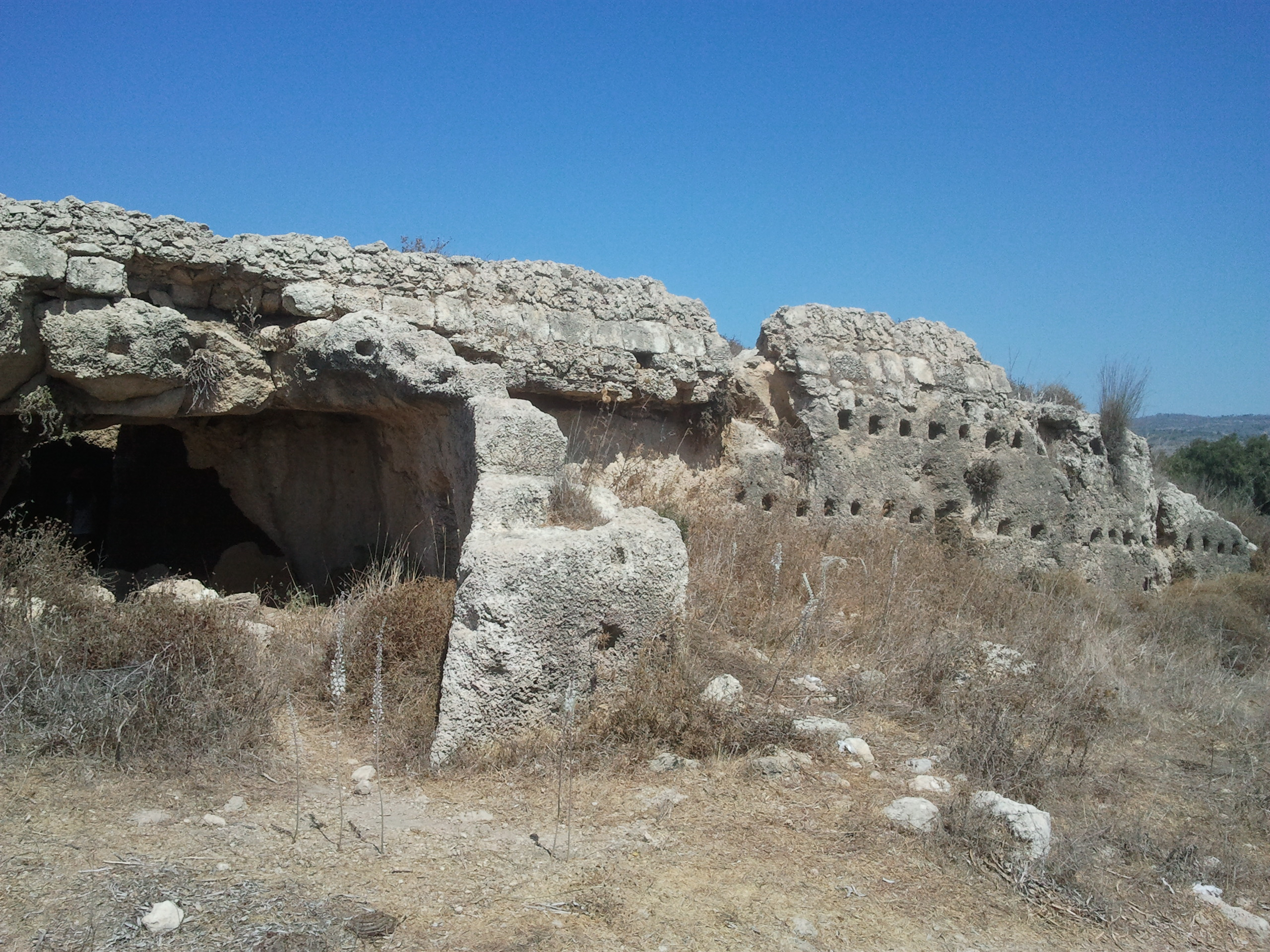 שמורת טבע חורבת קרתא, שוכנת במישור חוף הכרמל ליד עתלית. השמורה שוכנת מדרום למחנה המעצר בעתלית. השמורה משמרת את רכס הכורכר ובתי הגידול האופייניים לו וכן את האתר הארכאולוגי מבצר דטרוא הנמצא בתחומו